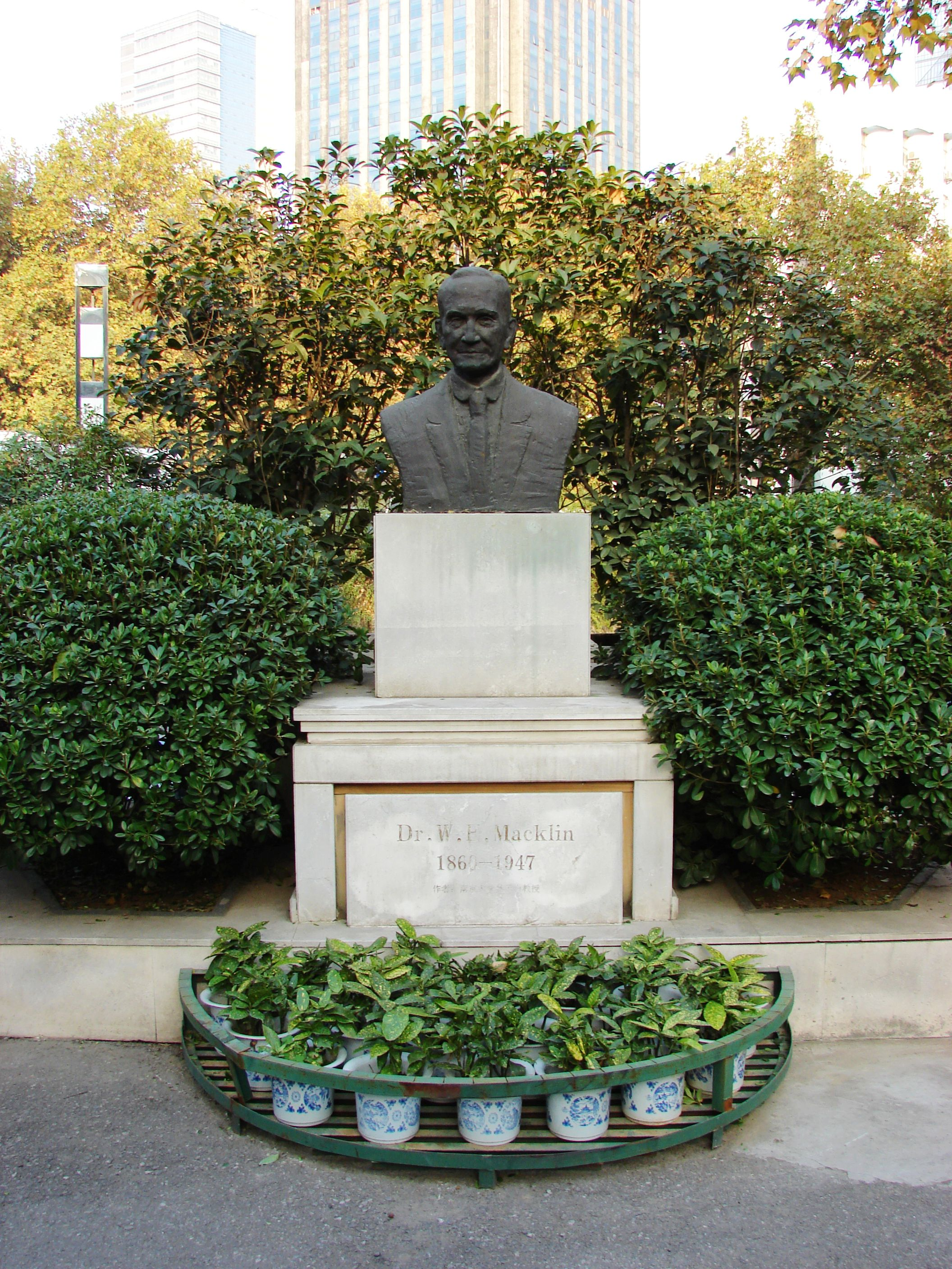 南京鼓楼医院内的传教士马林塑像。